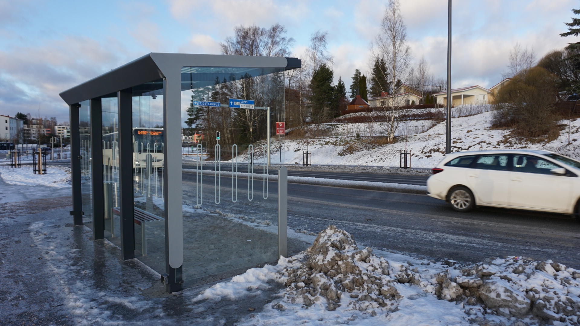 Bussipysäkki Klaukkalassa